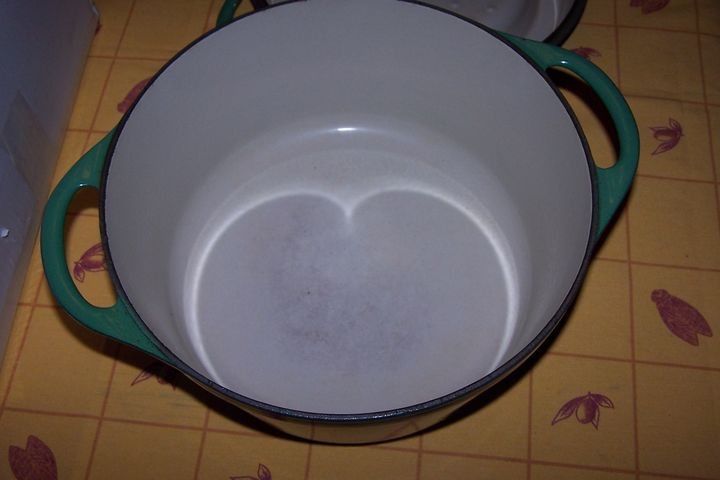 Cardioïde bien visible au fond d'une cocotte en fonte